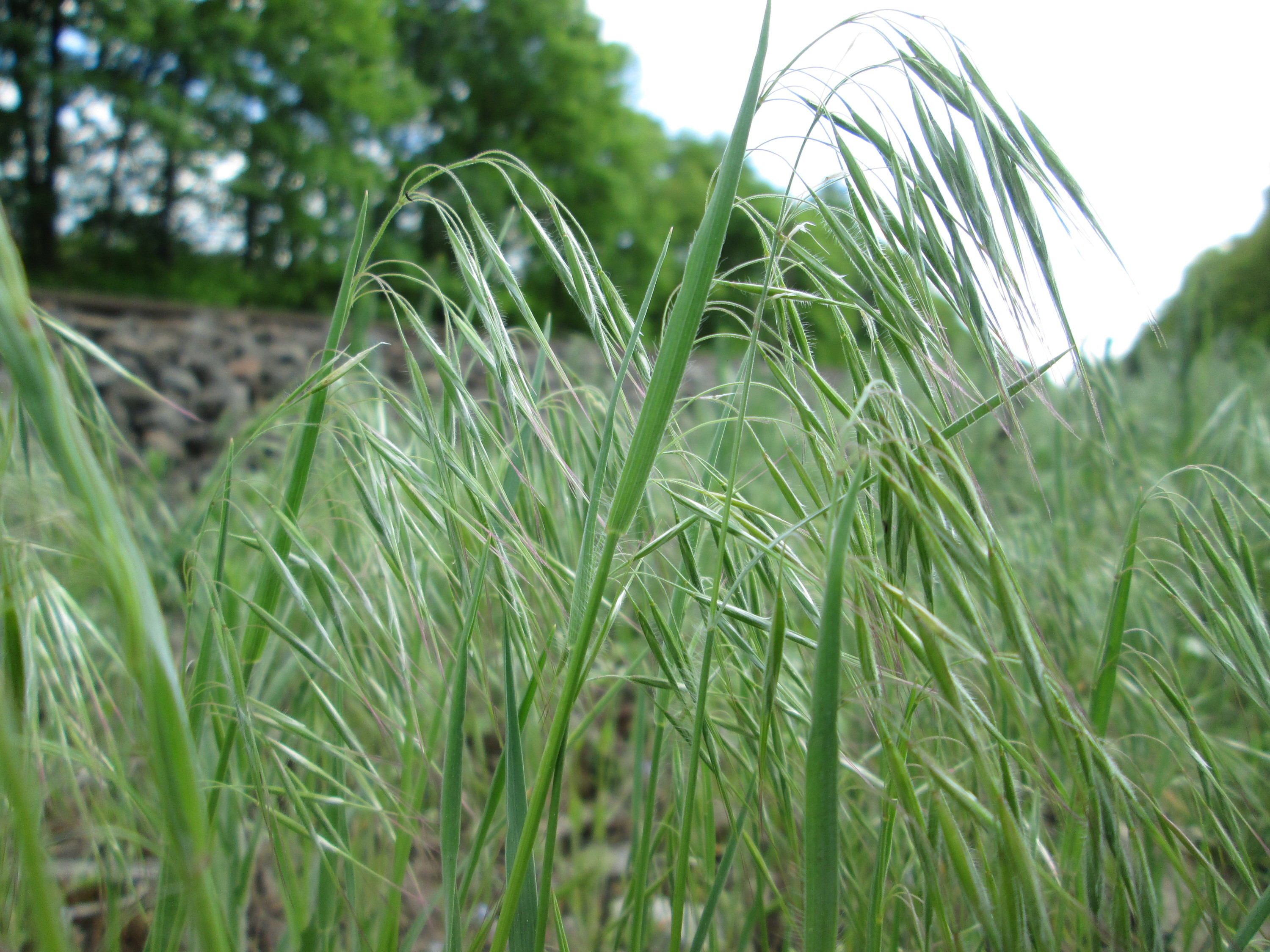 Wahrscheinlich die seltenere Dach-Trespe (Bromus tectorum) unmittelbar am Bahndamm in der Schwetzinger Hardt